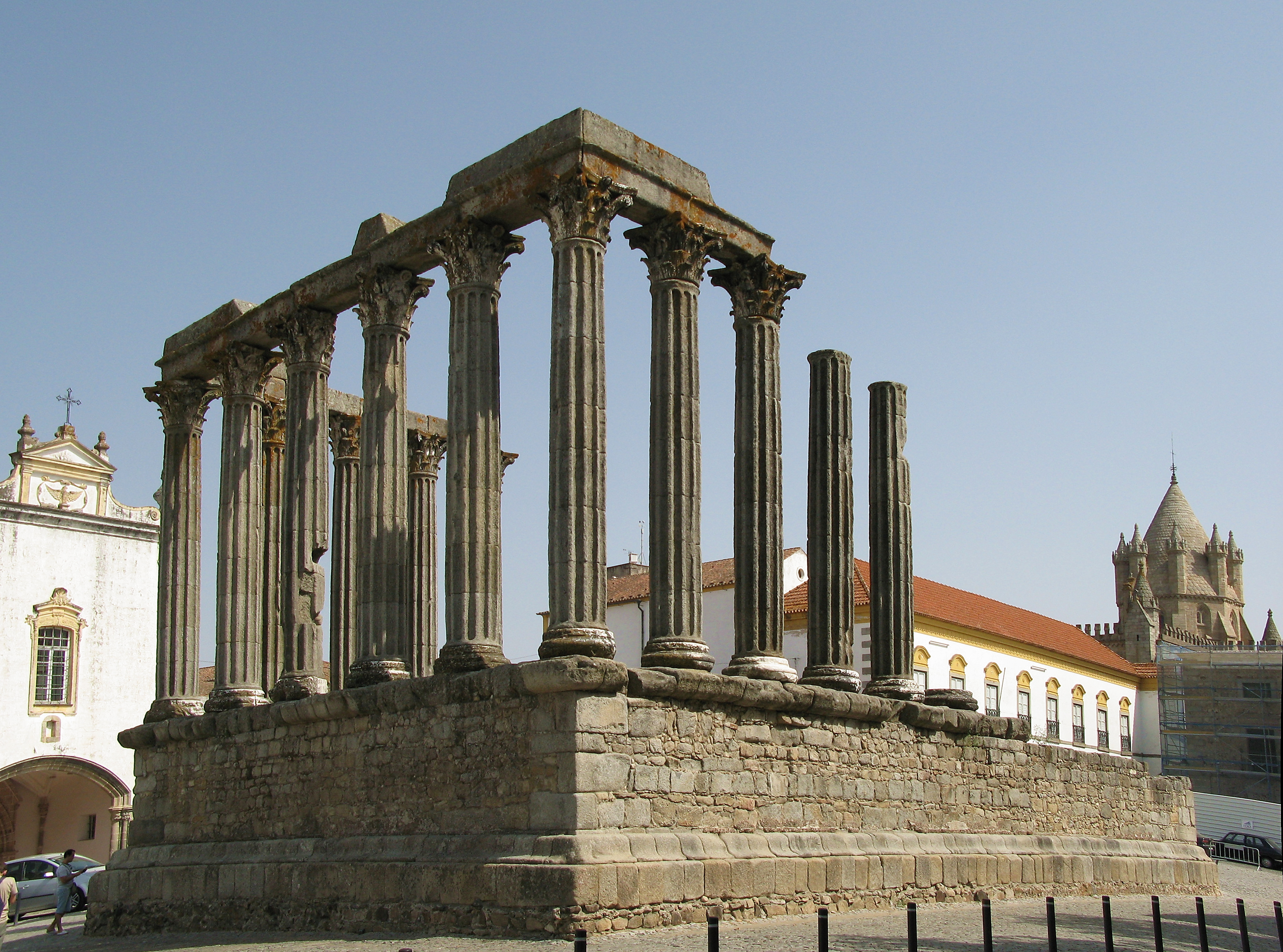 Roman Temple at Evora, Portugal